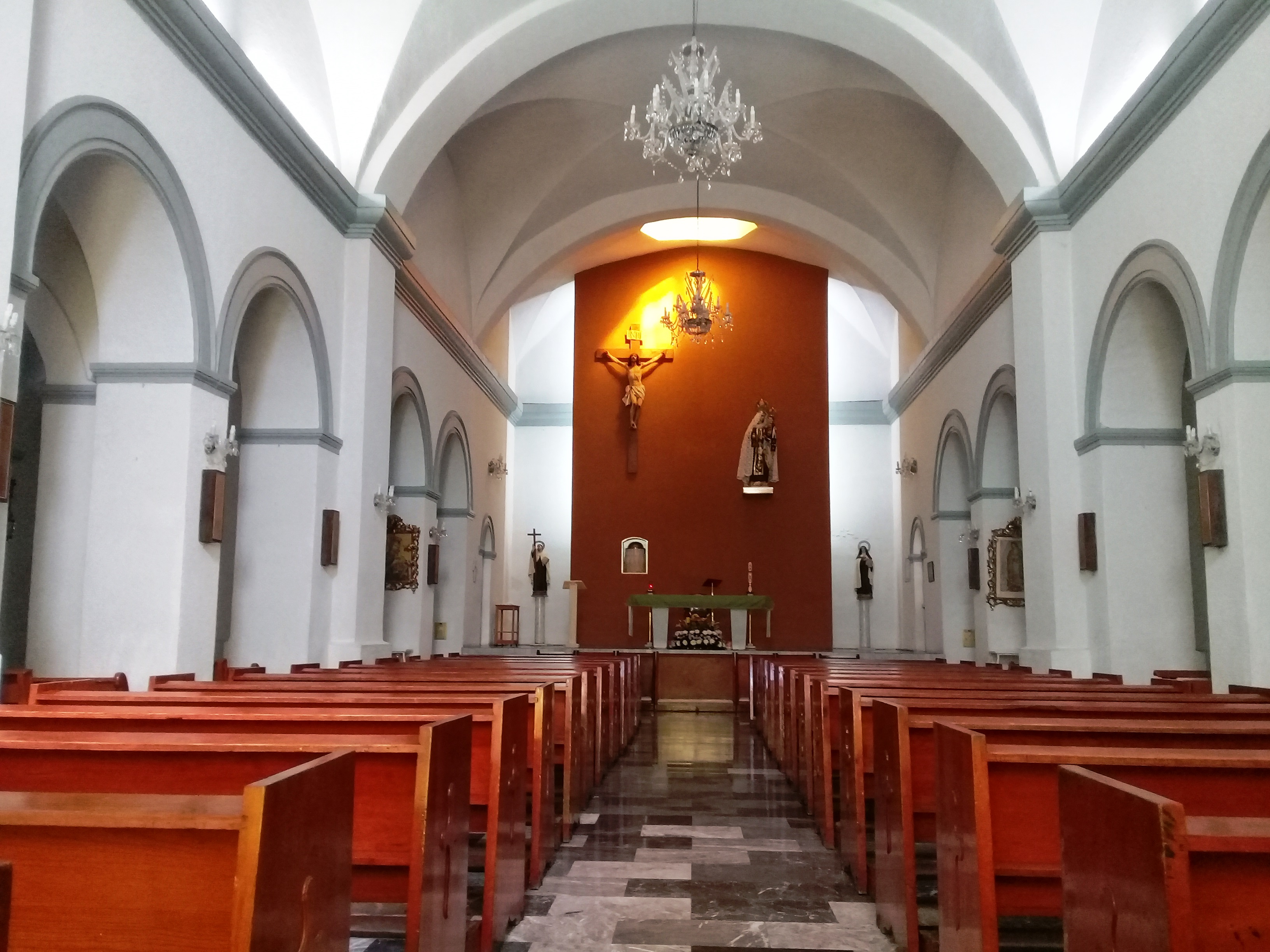 Parroquia de Nuestra Señora del Carmen, Pachuca.